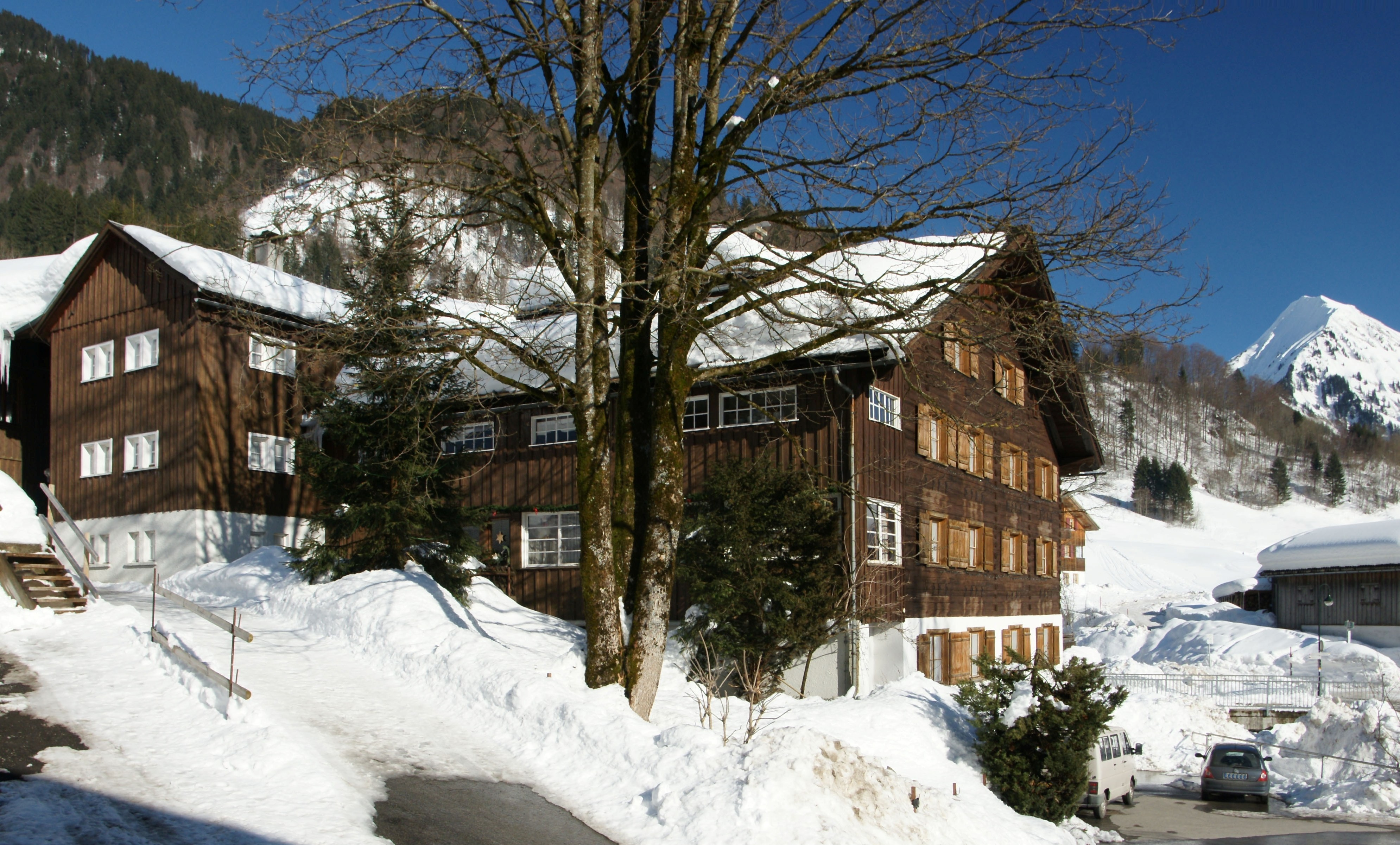 Im Dezember 1951 wurde der Kaufvertrag zum Kauf der „Alten Mühle“ in Au Rehmen unterschrieben. Damit war der Grundstein zur Gründung des Vorarlberger Kinderdorf gelegt.